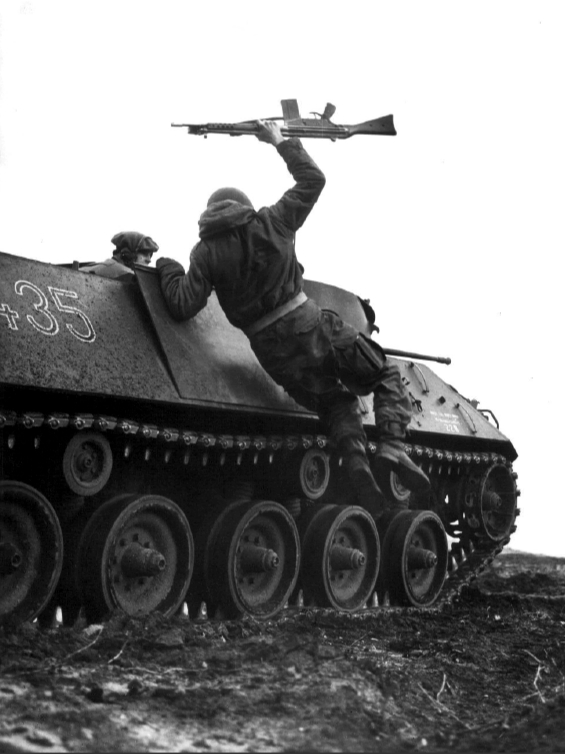 A West German soldier jumping from a Schützenpanzer Lang HS 30 during field maneouvers in 1960.